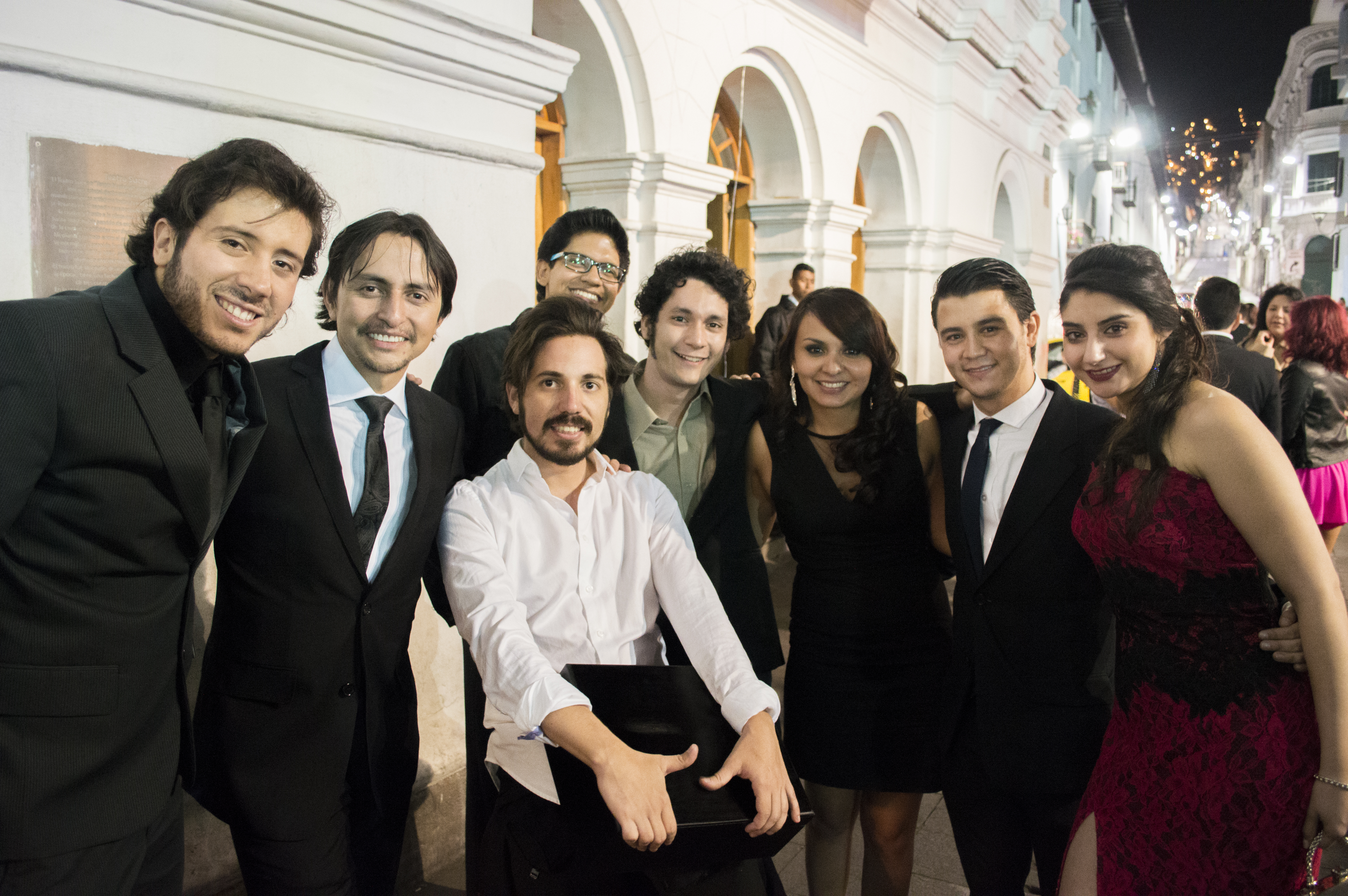 Parte del elenco de Enchufe.tv junto otros amigos luego de los Premios Colibrí en 2015. De izquierda a derecha; Jorge Ulloa, Orlando Herrera, Víctor Aráuz, Luis Avilés, Felipe Crespo, Nataly Valencia, Raúl Santana y Erika Russo.